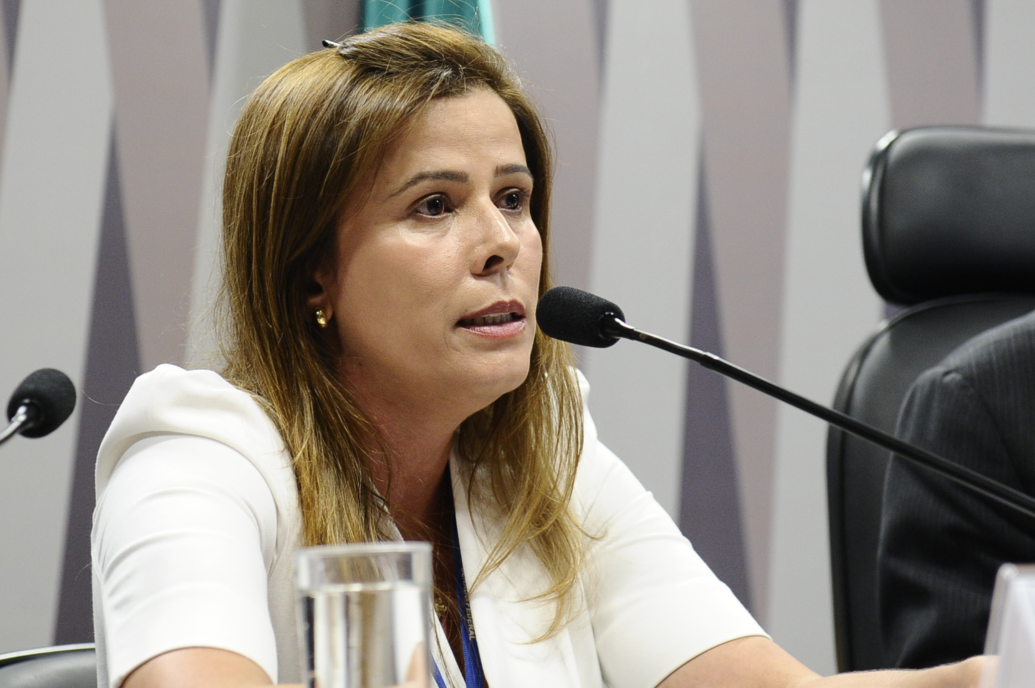 A Comissão Senado do Futuro (CSF) promove audiência pública para discutir o relacionamento do Senado com o cidadão. O colegiado não tem a mesma característica de outras comissões permanentes do Senado, por atuar exclusivamente como órgão de estudos e consultas, sem caráter deliberativo. Em pronunciamento, coordenadora de Relacionamento com o cidadão da Ouvidoria do Senado Federal, Regina Bezerra da Silva Fontes. Foto: Marcos Oliveira/Agência Senado